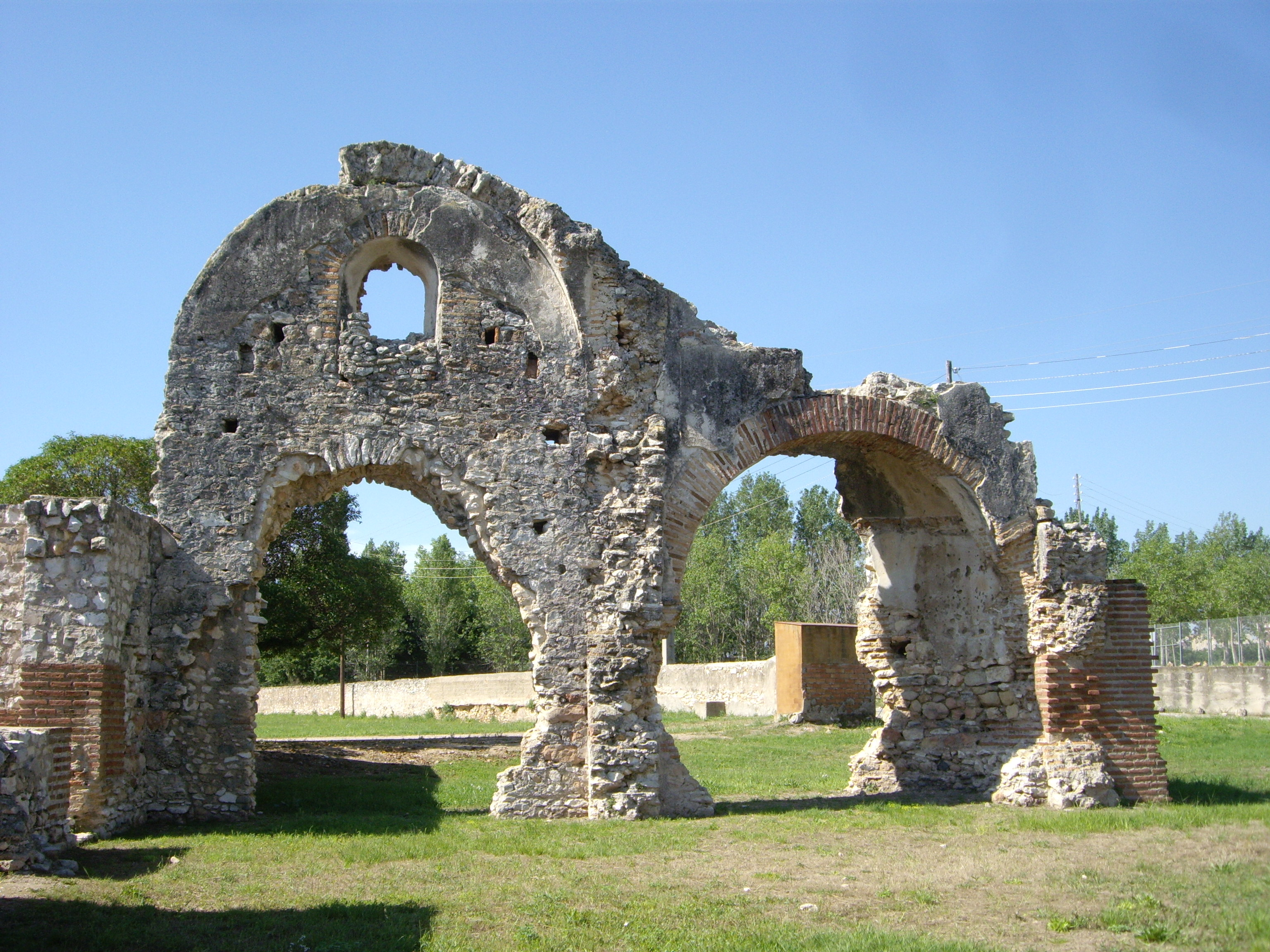 Restes de les termes del complex de Centcelles.